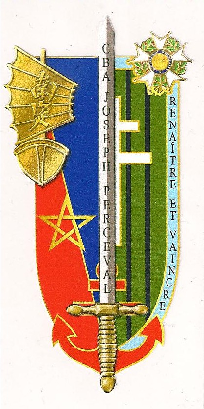 Insigne de la Promotion CBA Joseph Perceval du 4e Bataillon de l'Ecole Spéciale Militaire de Saint-Cyr - 2012/2013